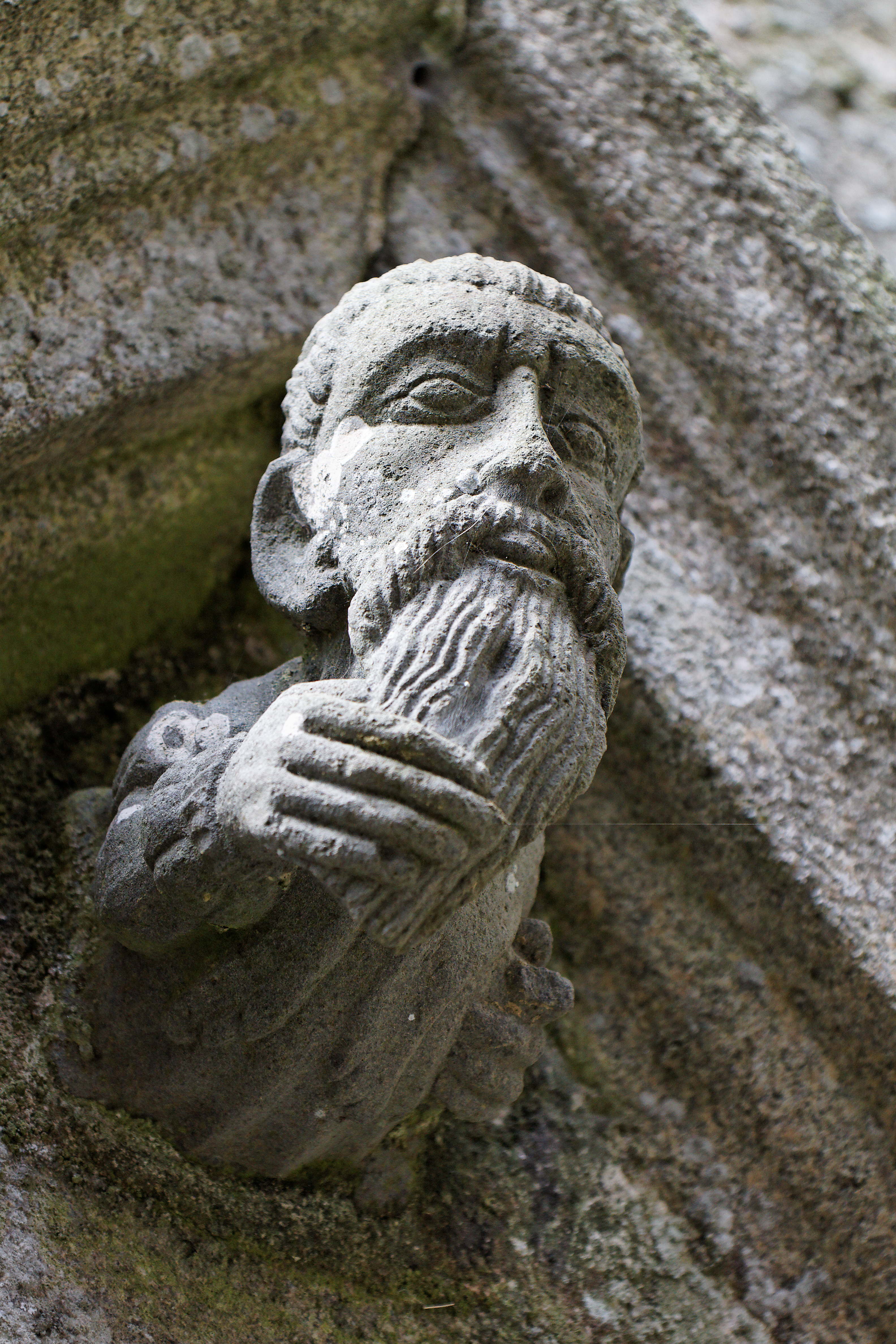 Une statue sur l'ossuaire, qui date de 1648. .